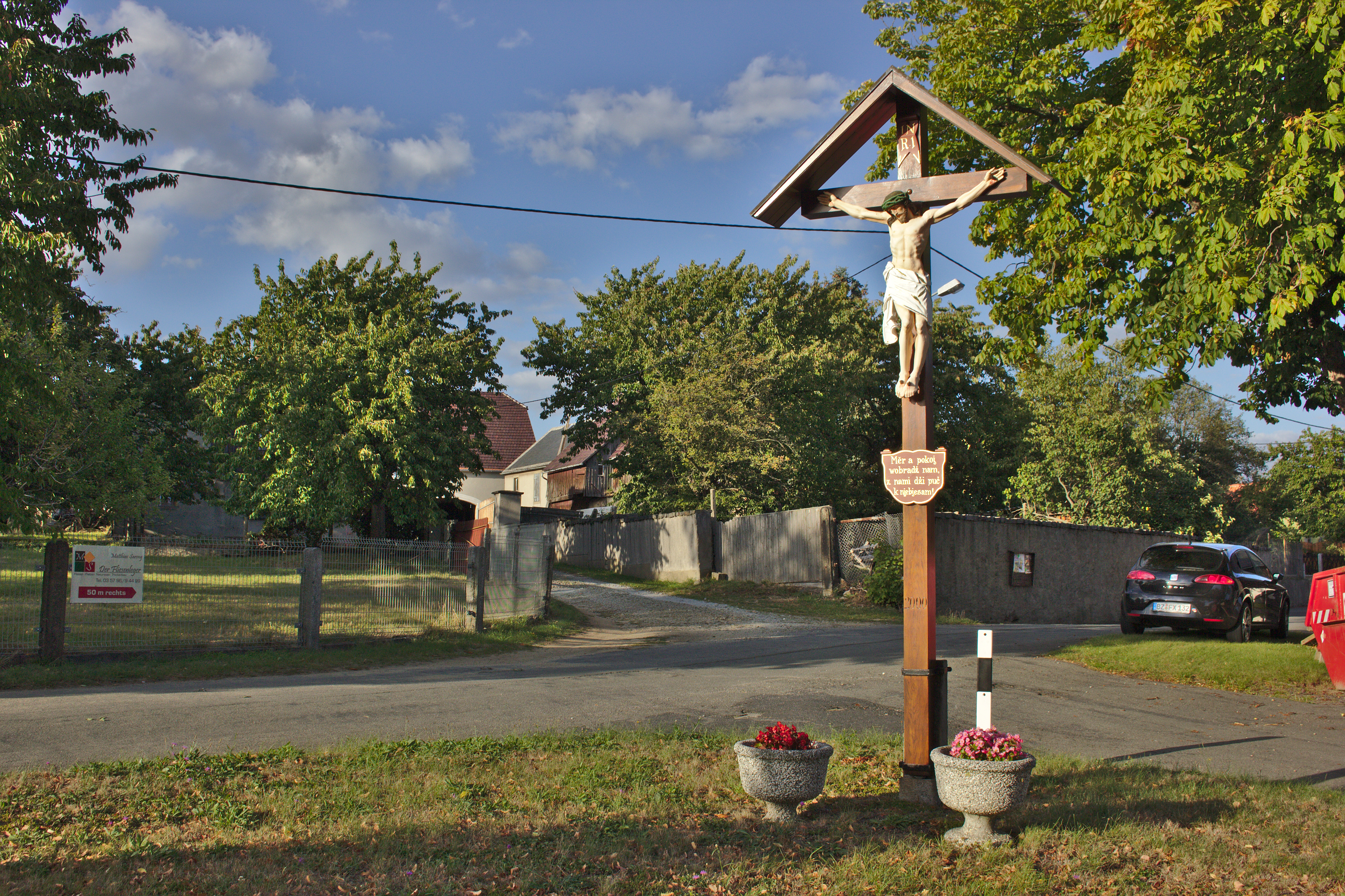 Hornjoserbsce: Swjaty křiž při nawsy we Wudworju